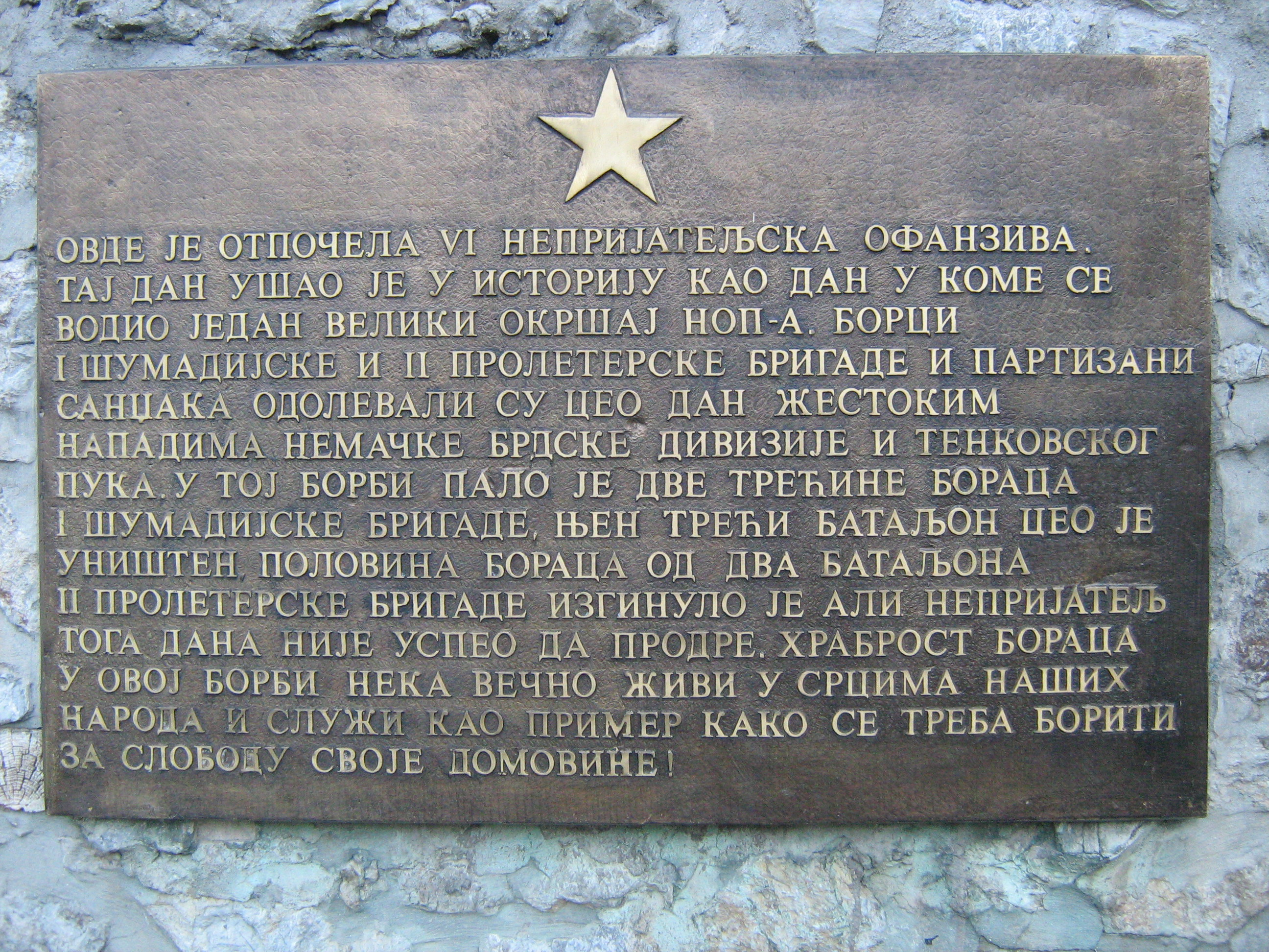 спомен плоча